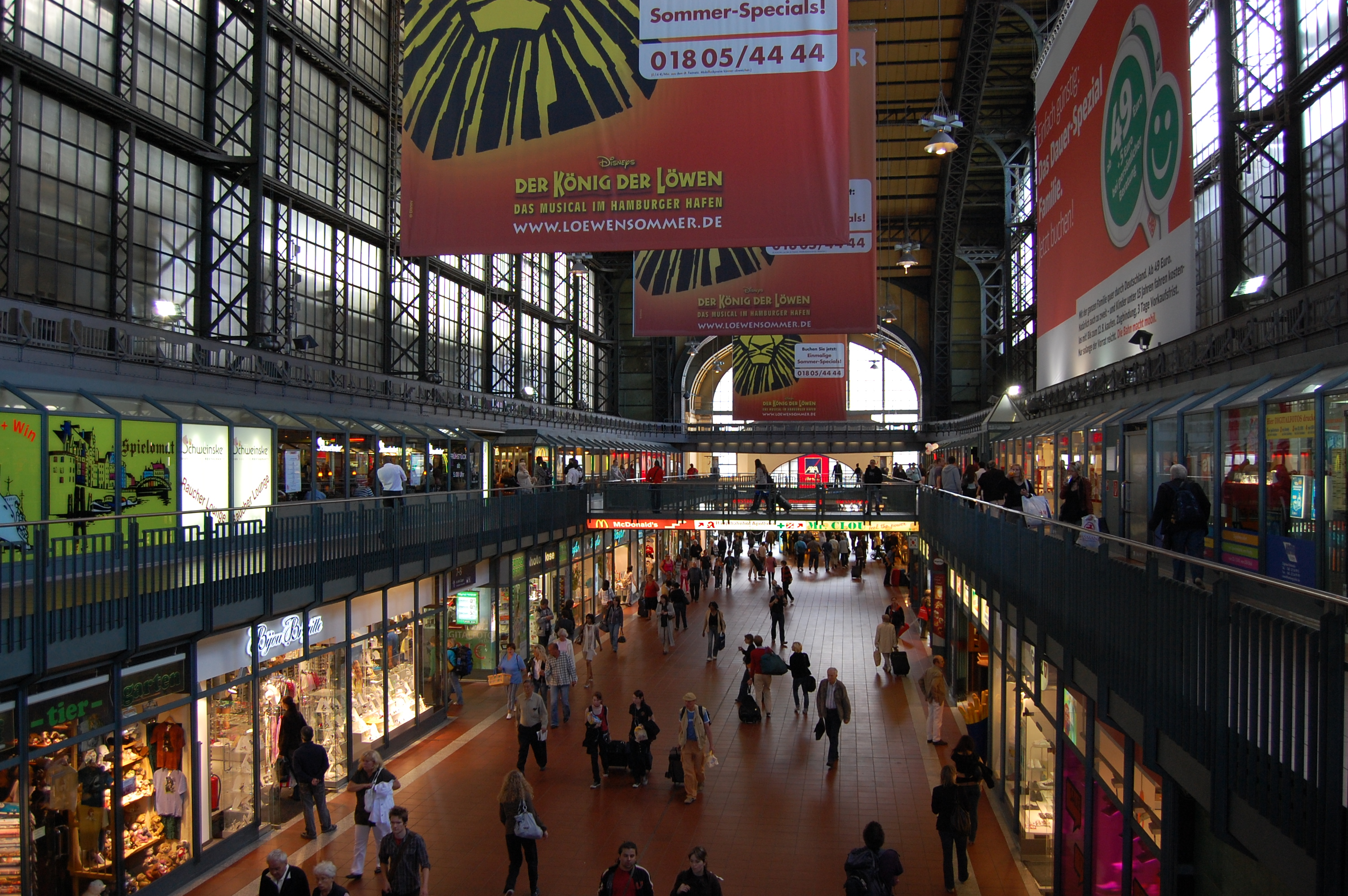 Die Wandelhalle im Hamburger Hauptbahnhof